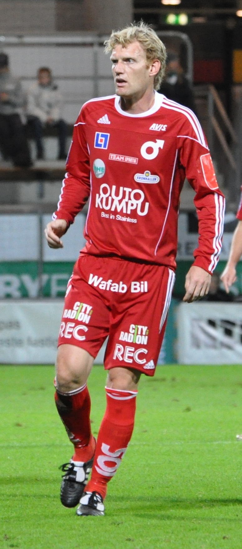 Sebastian Henriksson